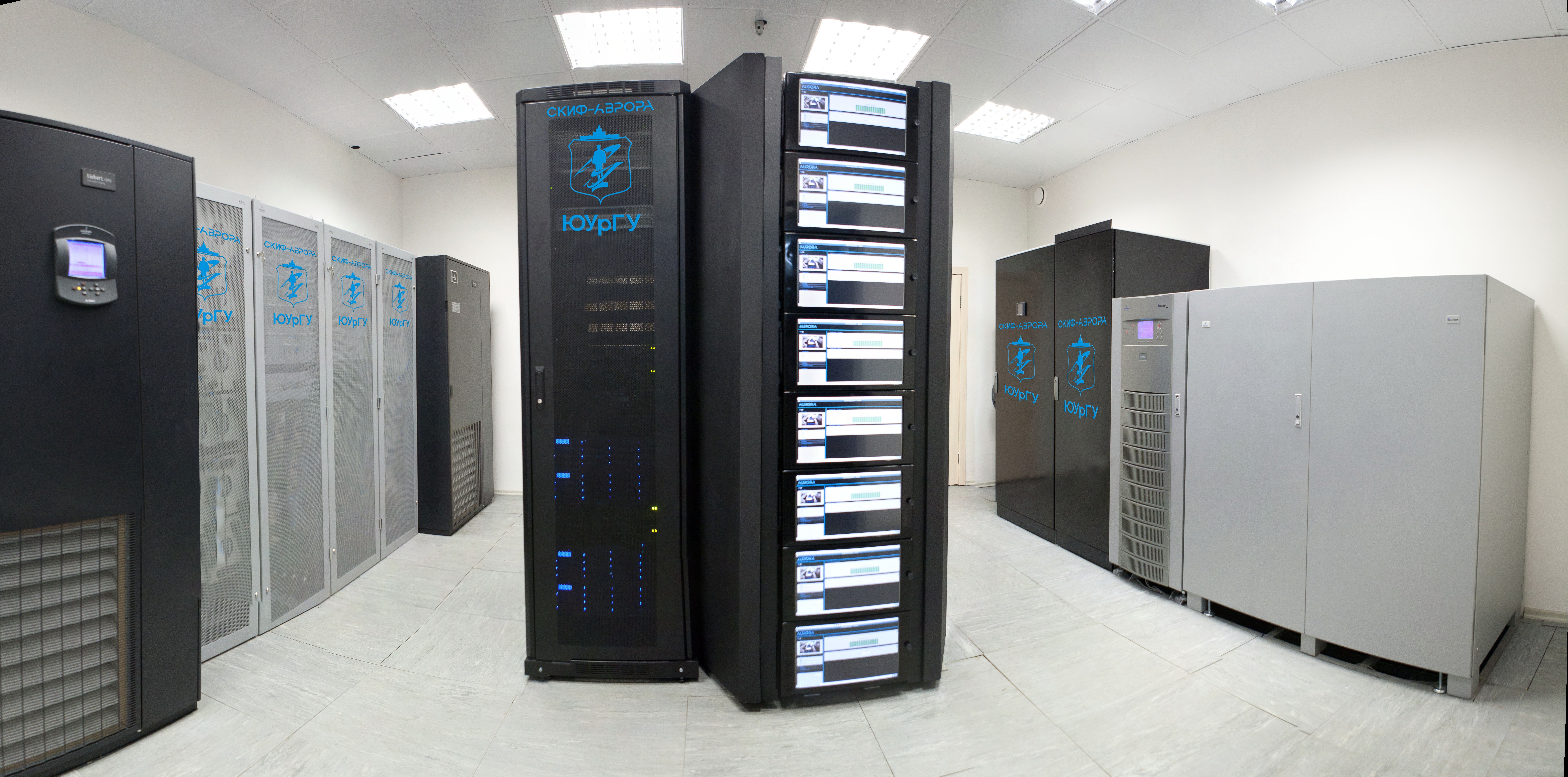 Фотография суперкомпьютера "СКИФ-Аврора ЮУрГУ" Южно-Уральский государственный университет